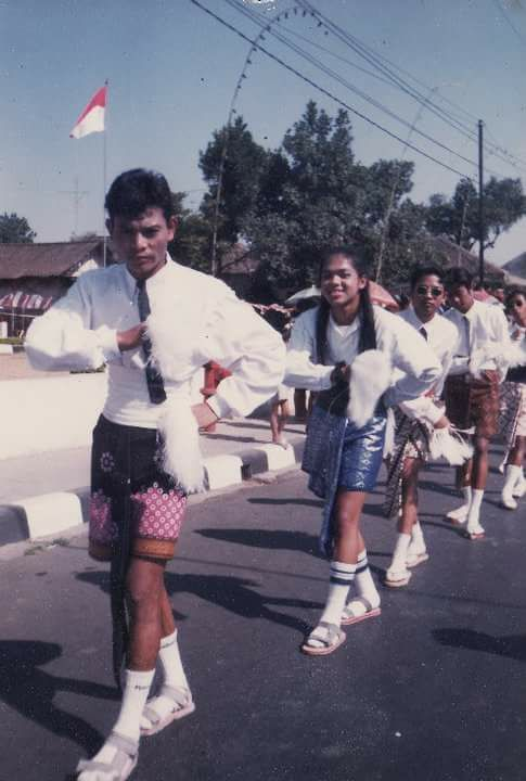 Barisan theklek Drumblek Gempar ketika tampil dalam festival kesenian Kota Salatiga tahun 1990-an.